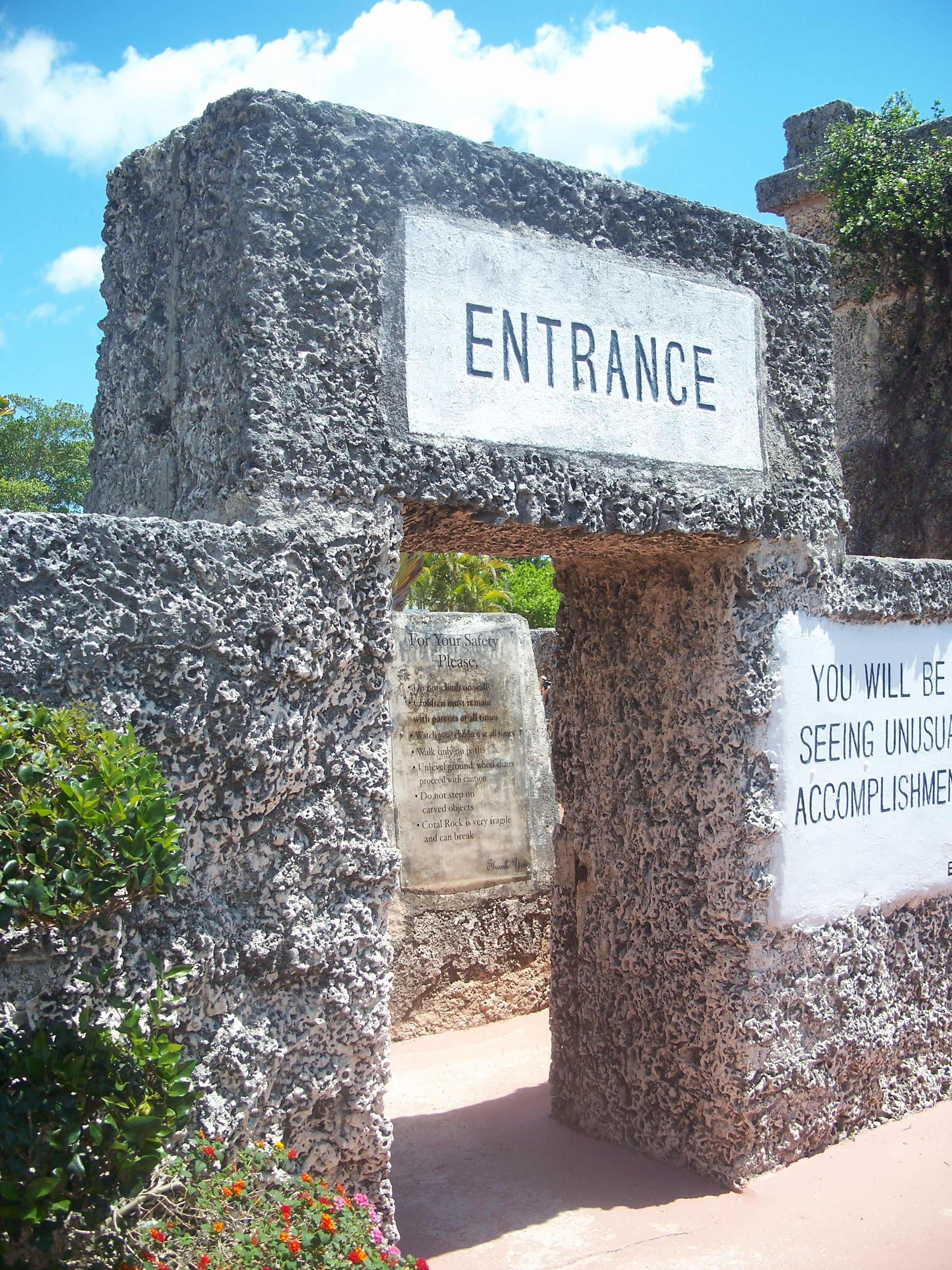 Homestead, Florida: Coral Castle: Entrance